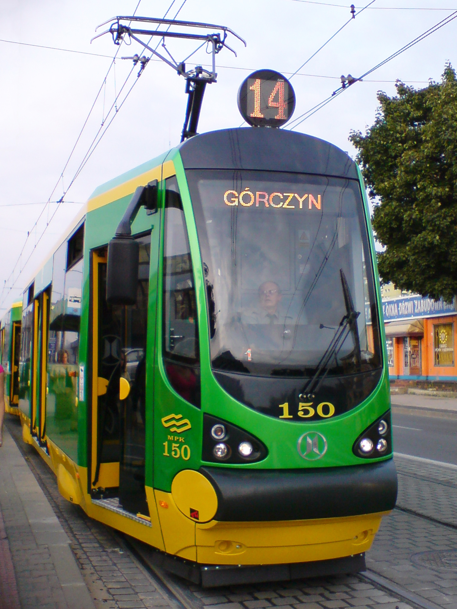 Moderus Alfa tram made by in Poznań, Poland.